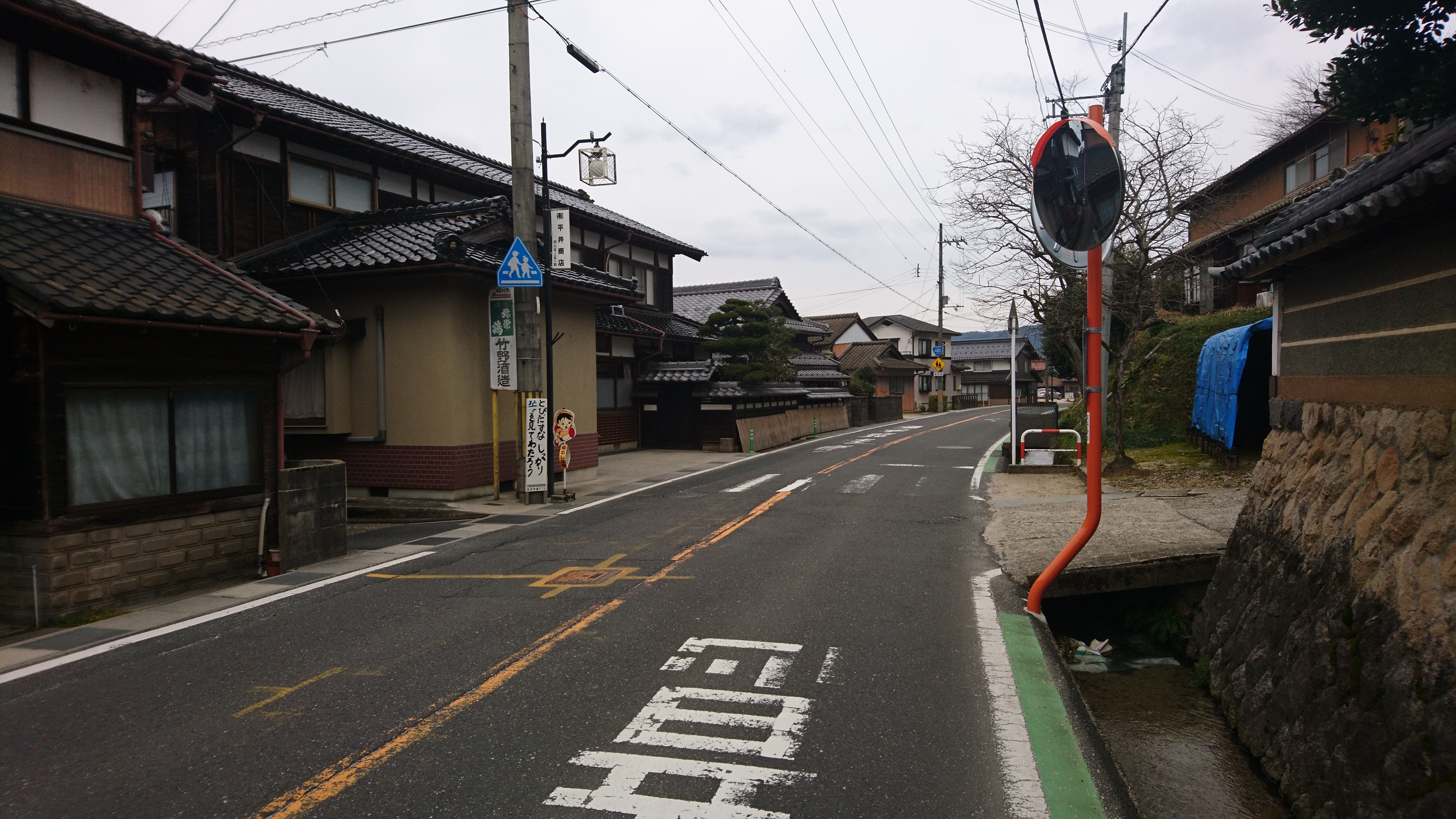 竹野酒造有限会社（京都府京丹後市弥栄）前 国道482号線 網野方面